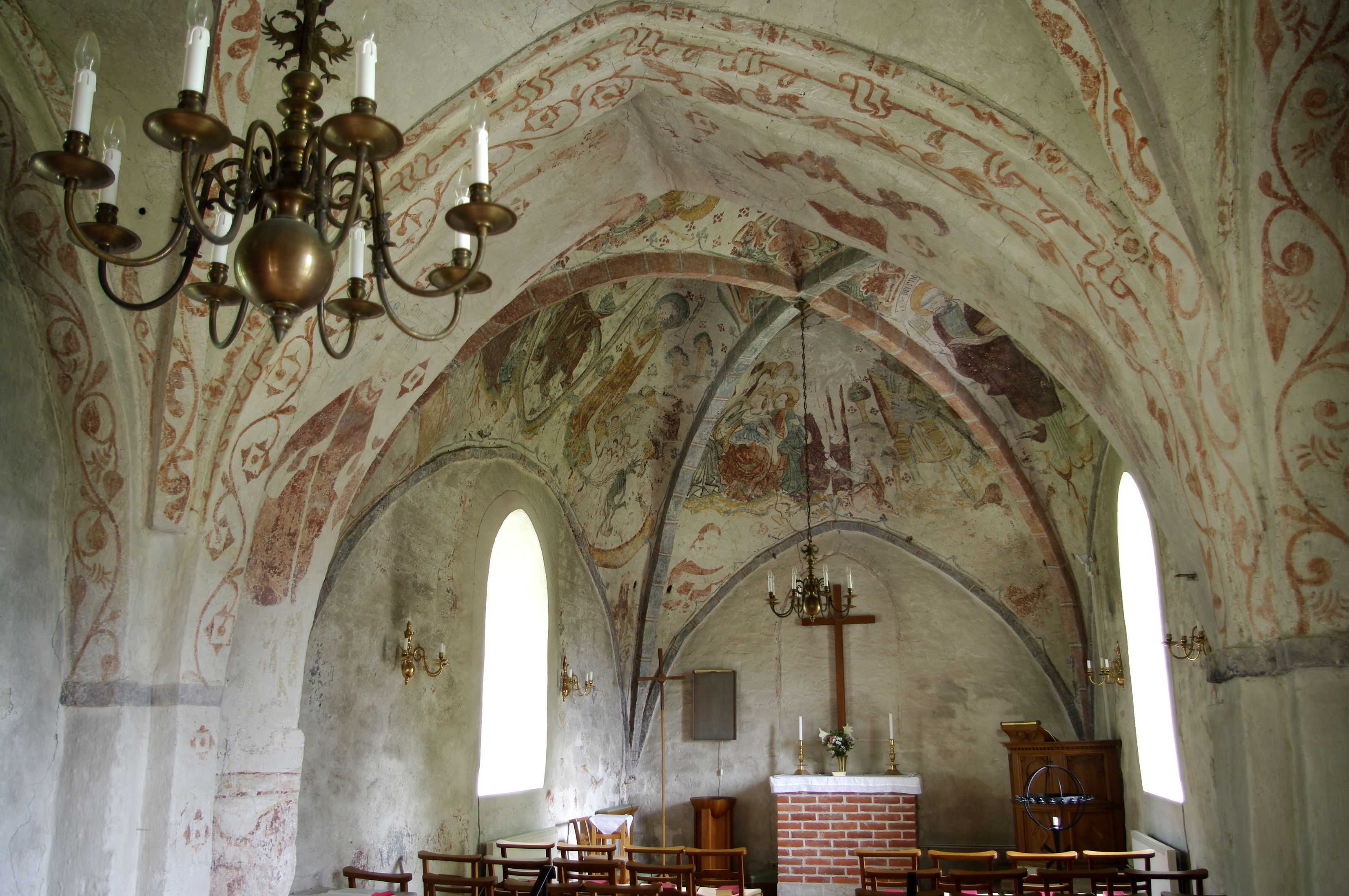 Hyby gamla kyrka, Skåne, Sverige.